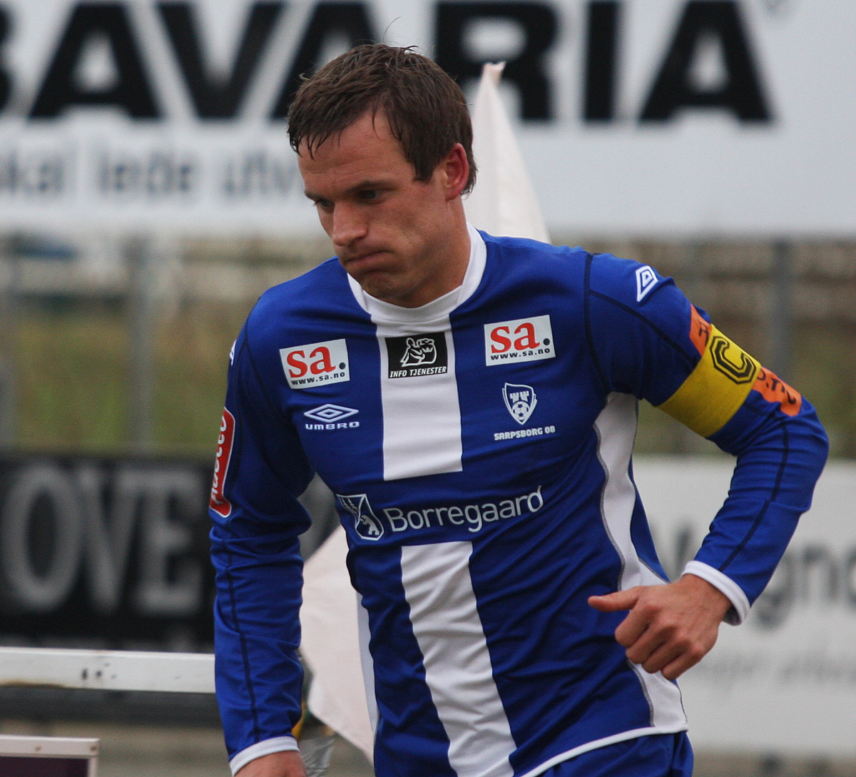 Kjetil Berge, Sarpsborg